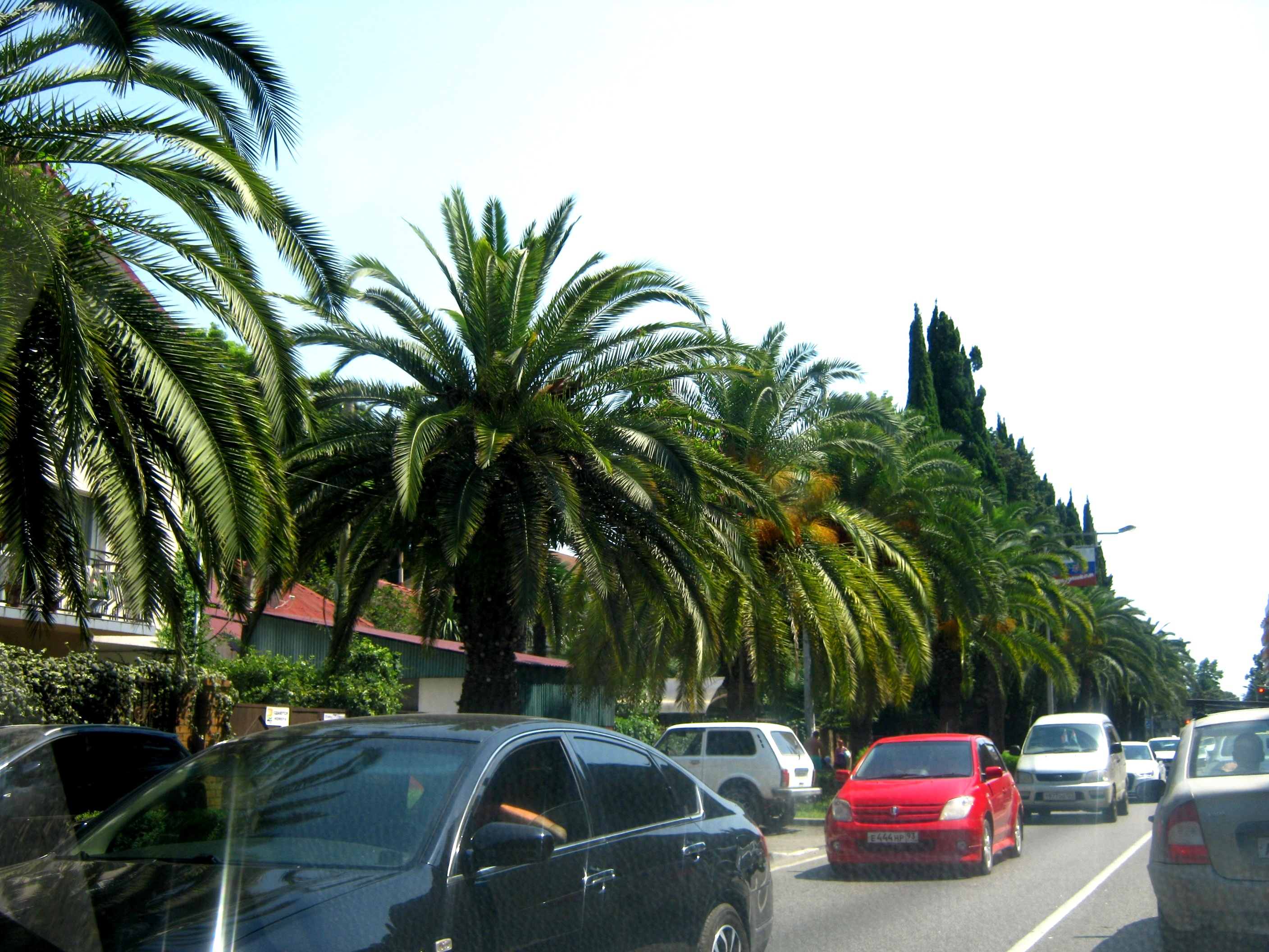 Пробка на улице Ленина (Сочи)